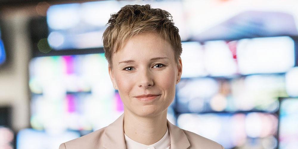 Fotograf: Thomas Plain